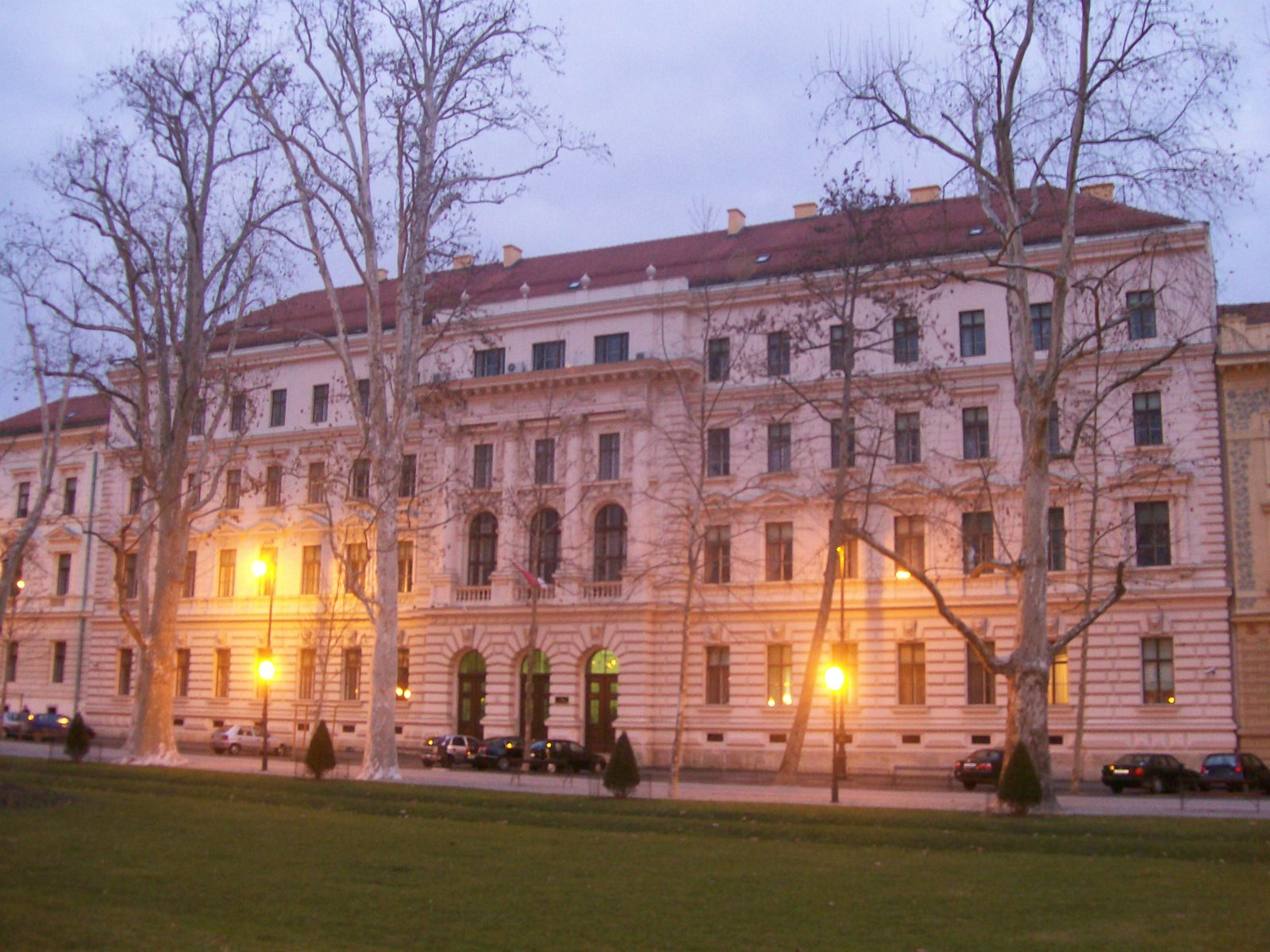 Županijski sud u Zagrebu